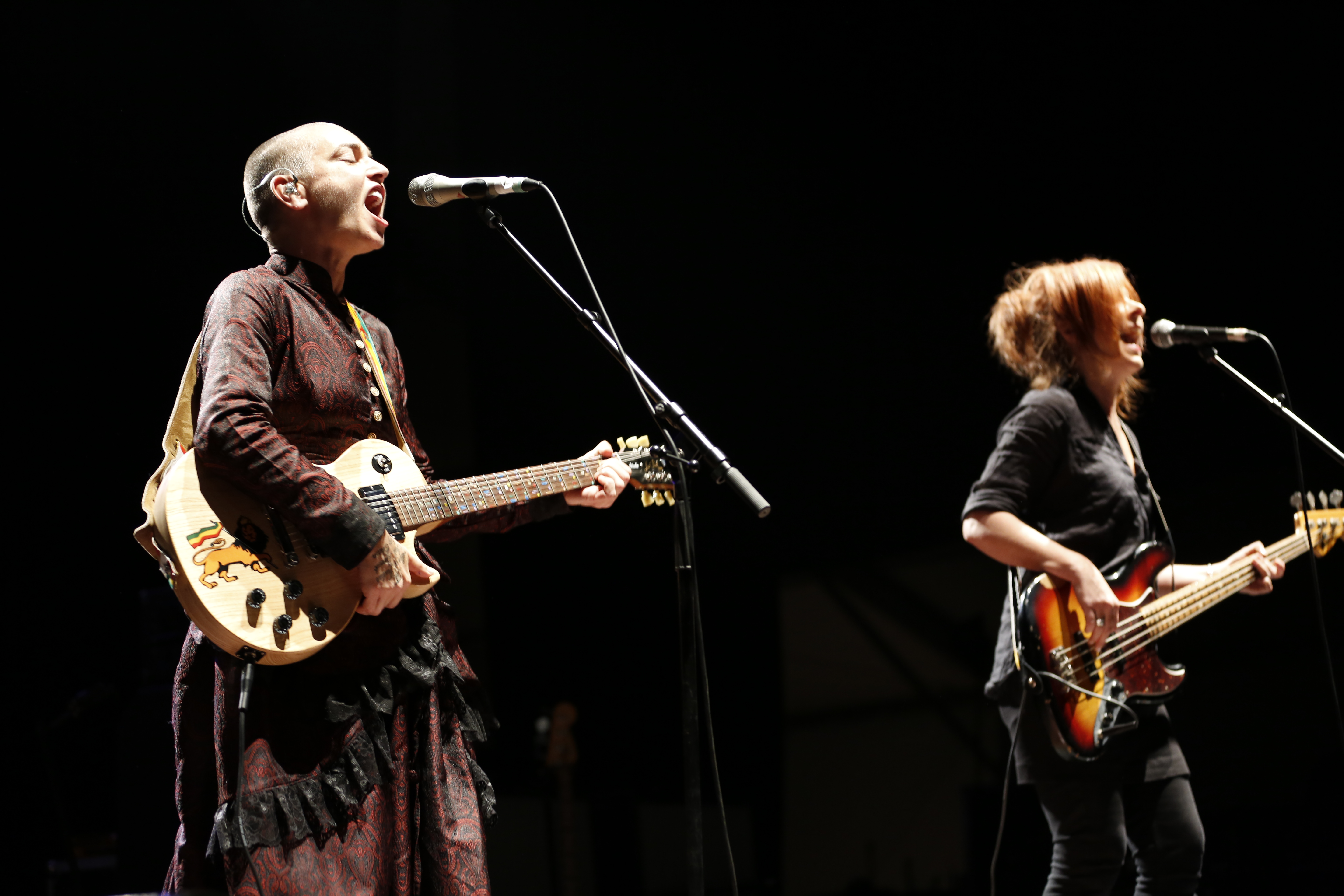 Sinéad O'Connor et sa bassiste Clare Kenny lors du Festival interceltique de Lorient, le 10 août 2013.